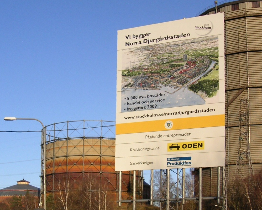 Norra Djurgårdsstaden innan byggarbeten, byggskylt